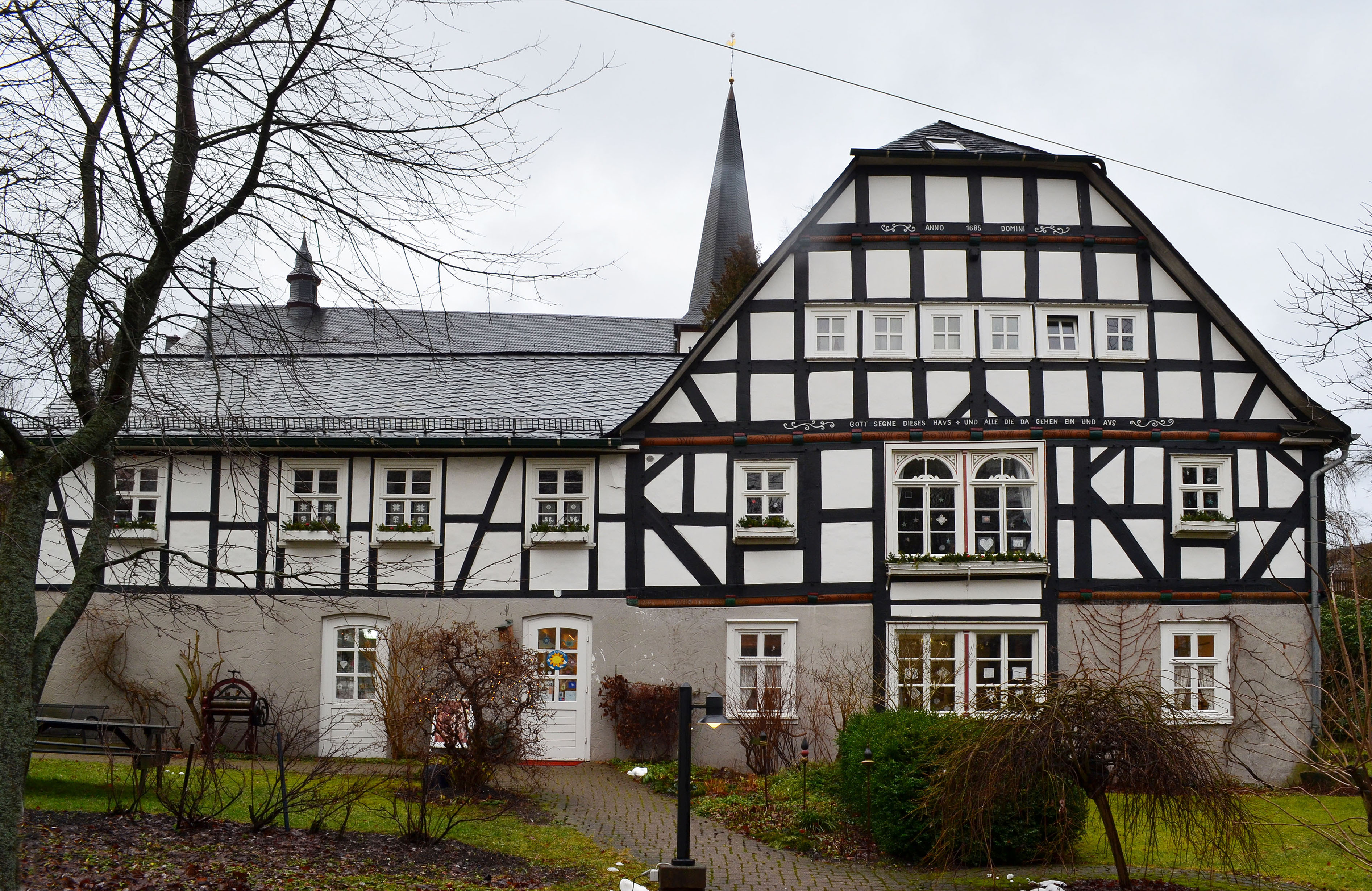 Gebäude (Anno 1685) mit denkmalgeschützter Fachwerkfront in Oberhundem. Im Gebäude wird ein privates Stickereimuseum betrieben.